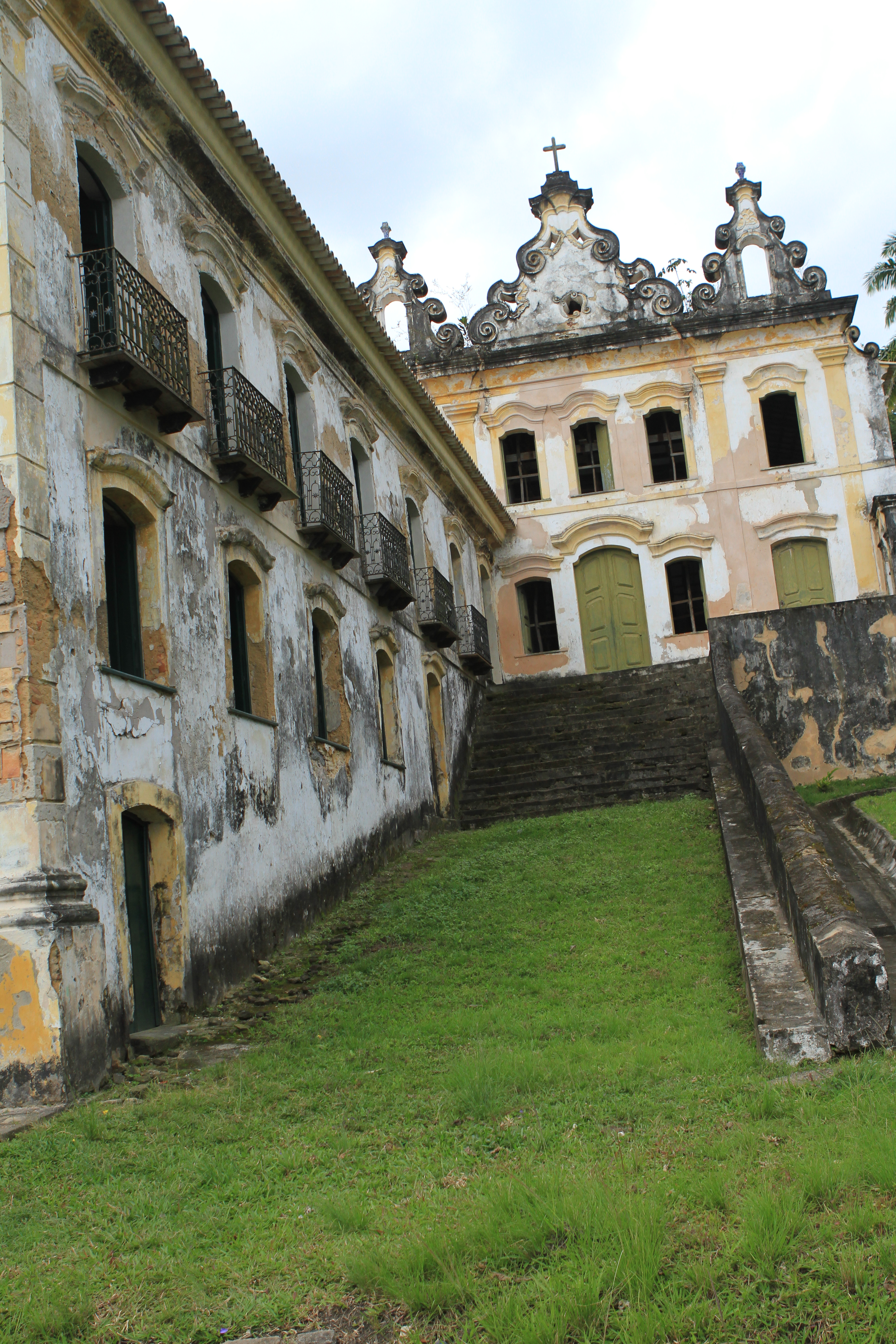 Caboto. Foto- Tatiana Azeviche (134)